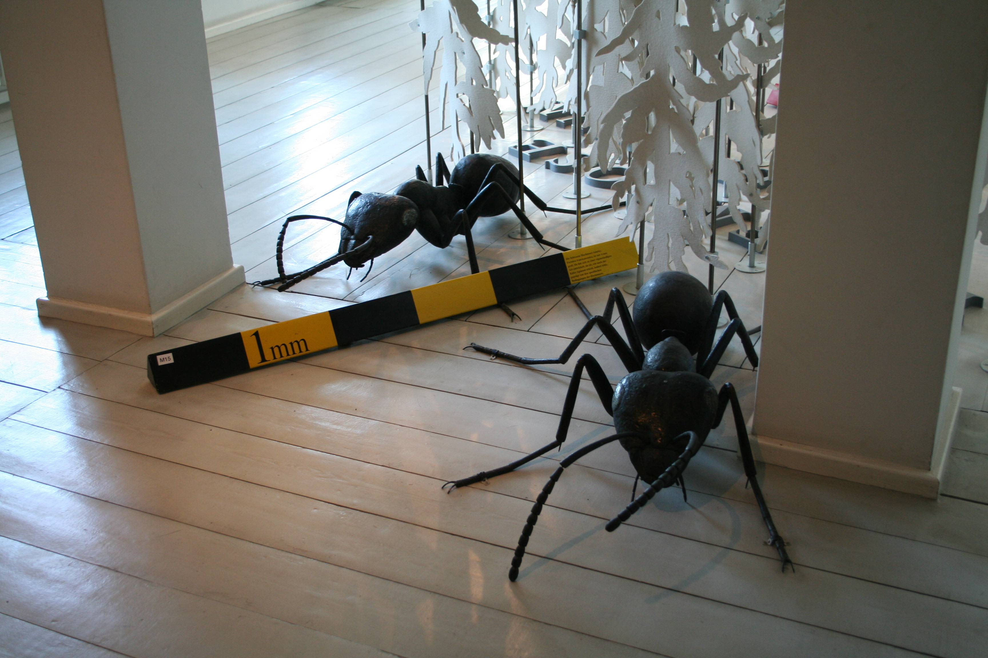 Landesmuseum für Natur und Mensch, Oldenburg